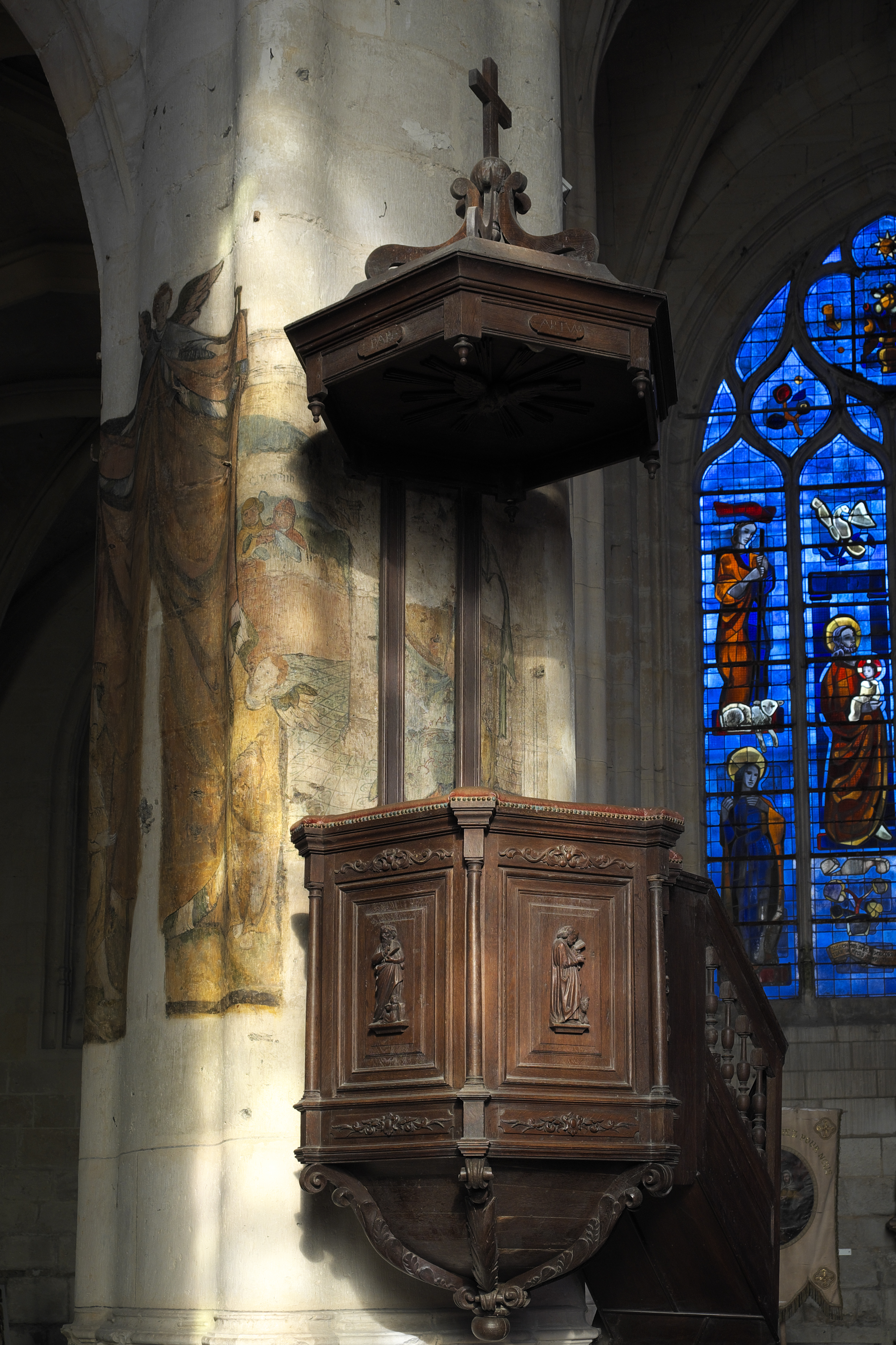 Katholische Pfarrkirche Notre-Dame in Vétheuil im Département Val-d’Oise in der Region Île-de-France (Frankreich), Kanzel